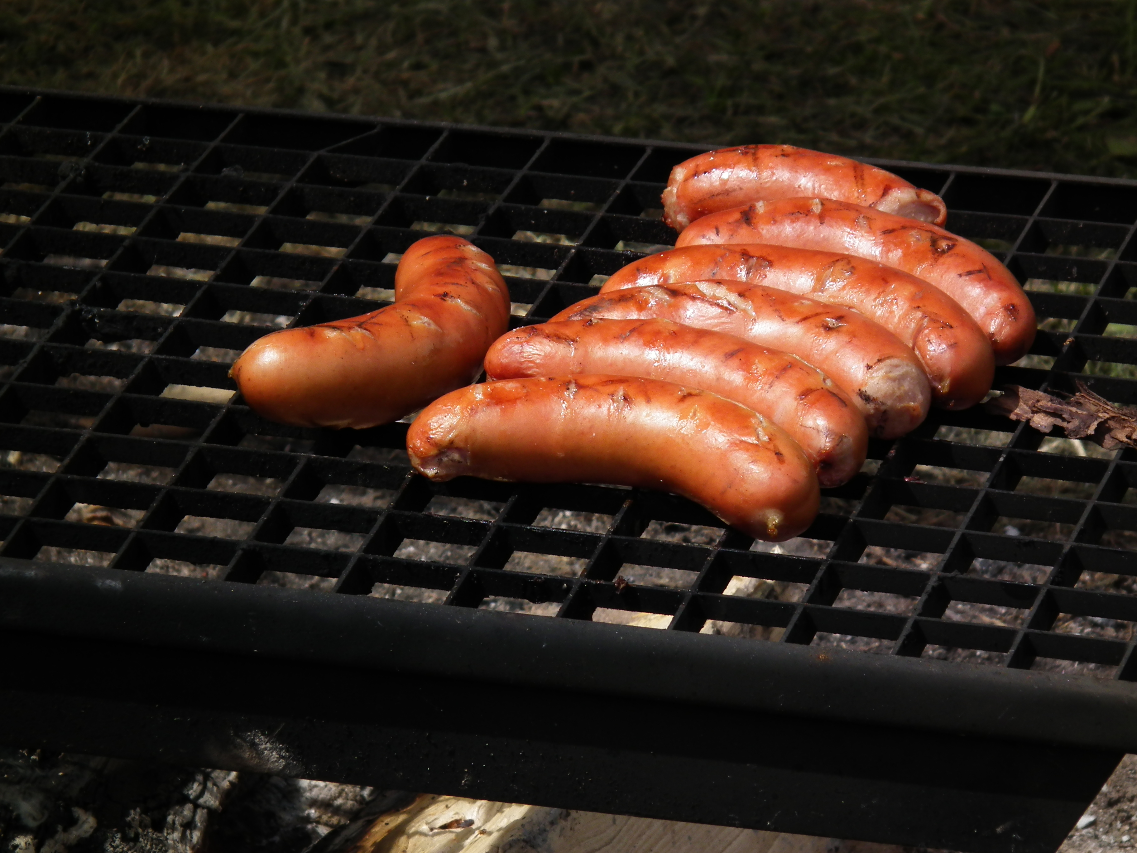 Rote Bratwürste auf einem Grillrost, fotografiert in Deutschland